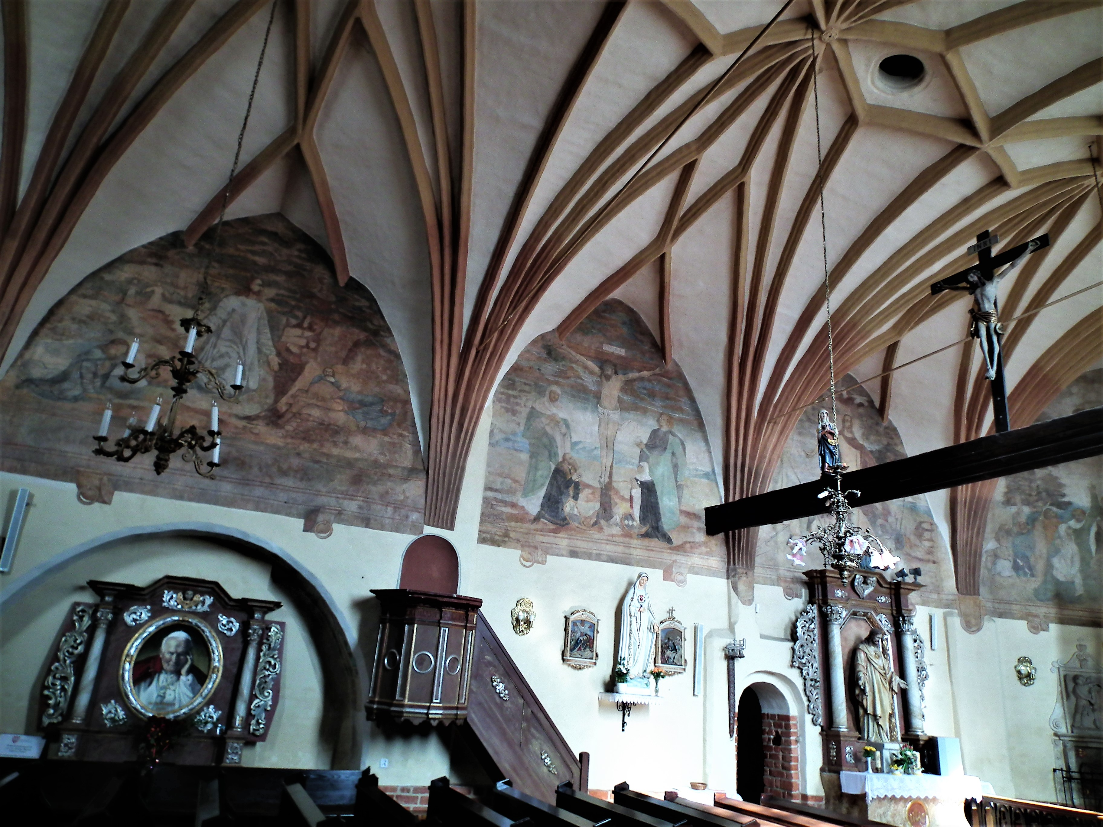 Kościół św. Jadwigi w Wilkowie Polskim.